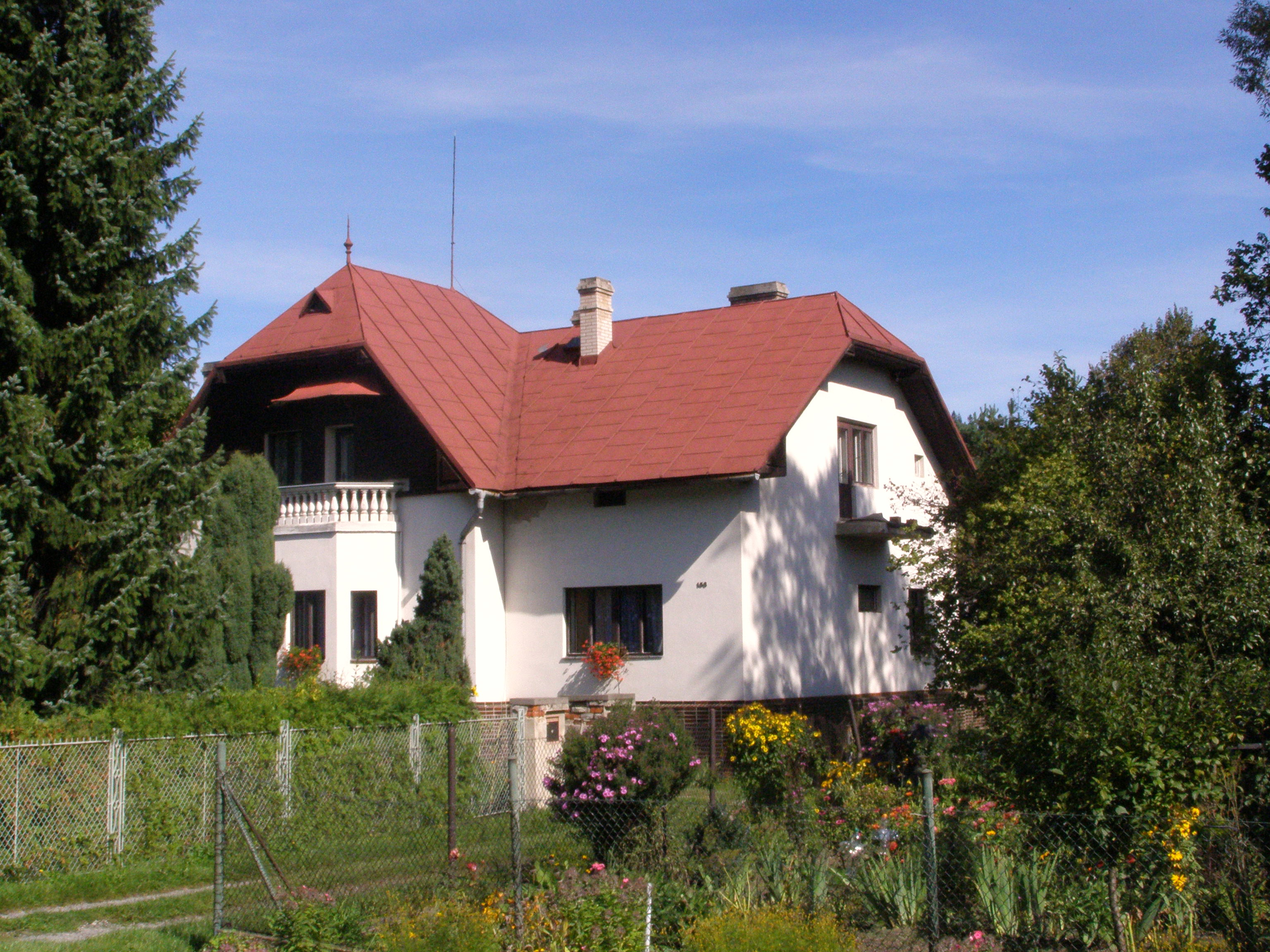 Metylovice, vila významné řemenářské rodiny Bílků